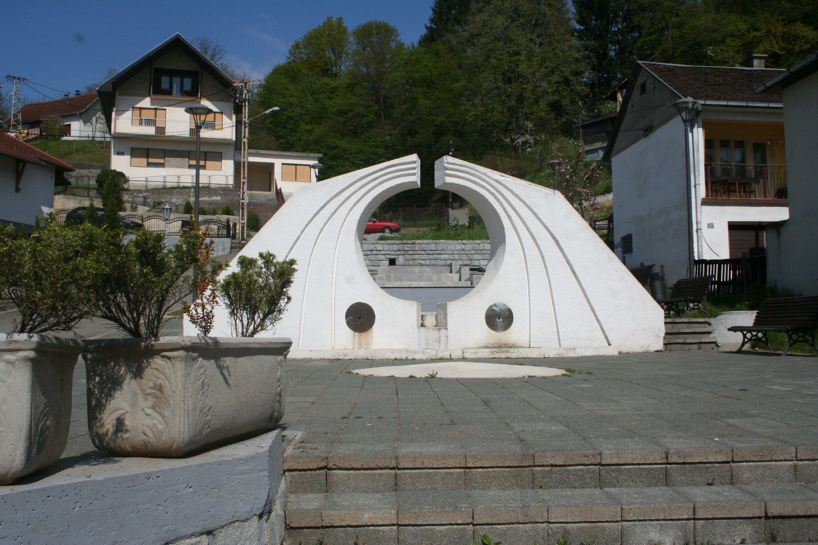 Ljubovija